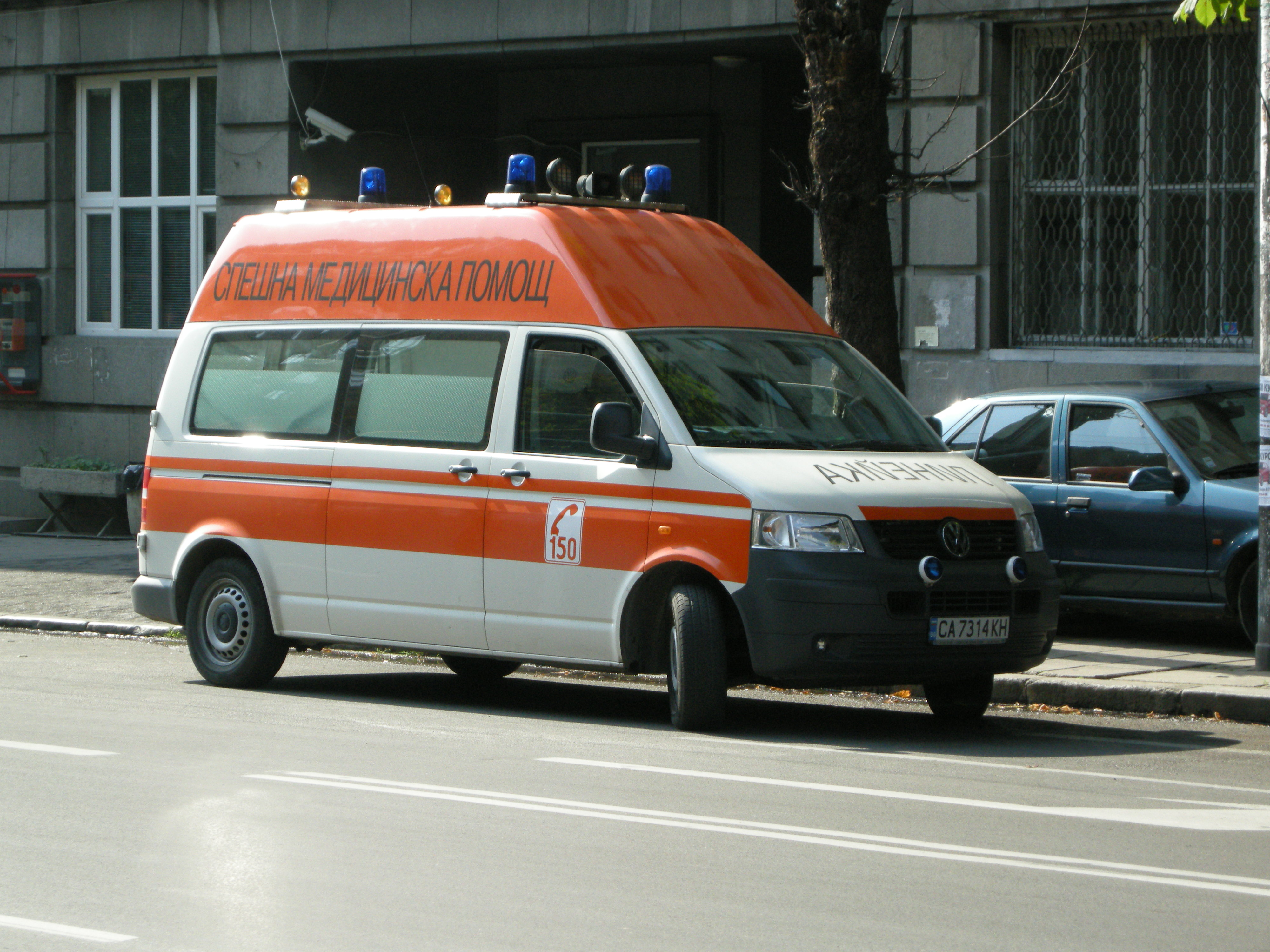 Линейка в София.